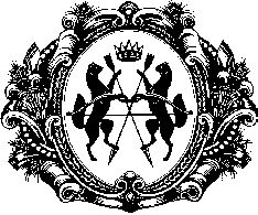 SibCoat-o'-arms: Стилізований герб Сибіру